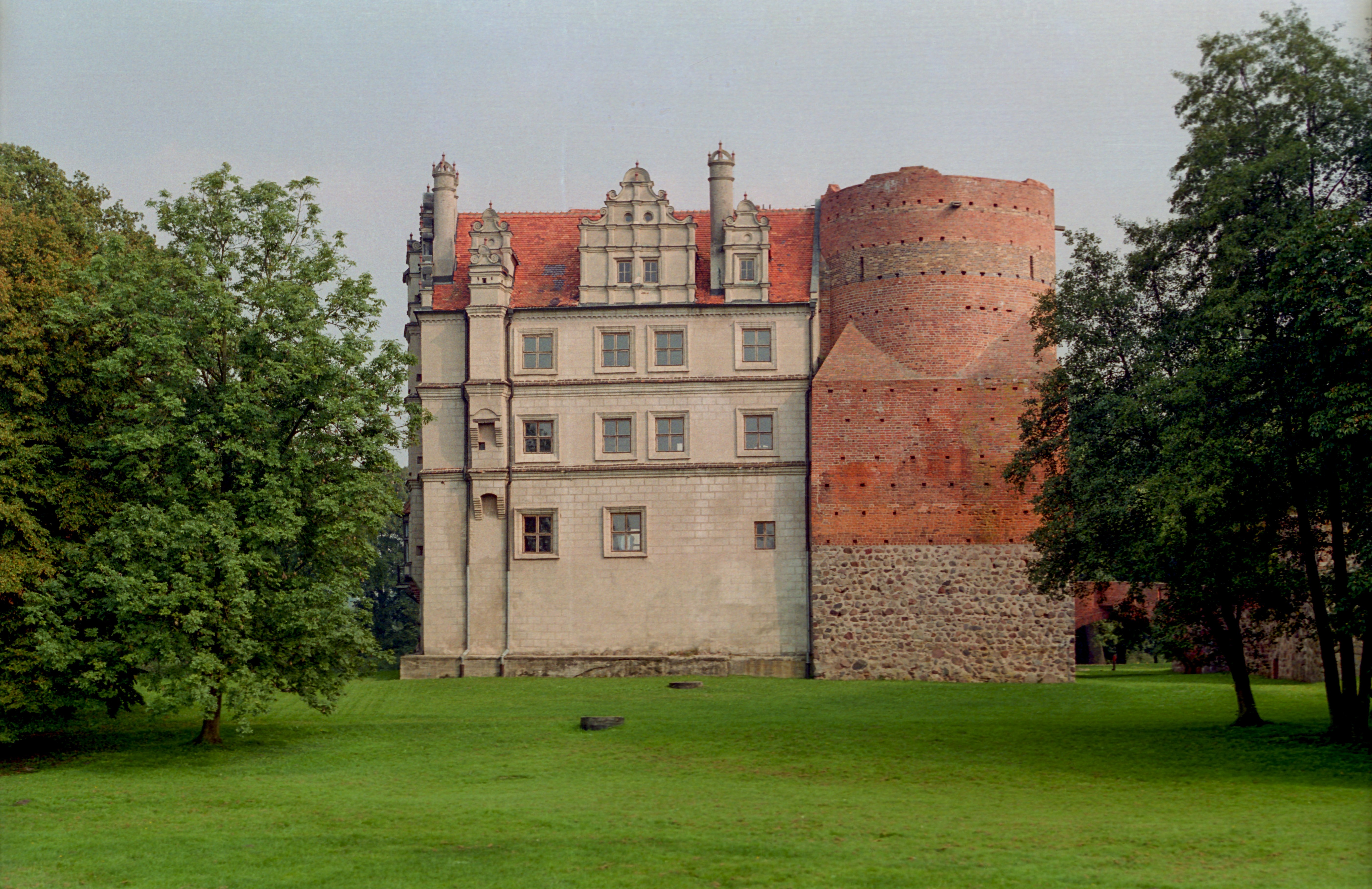 Poland, Pęzino Castle